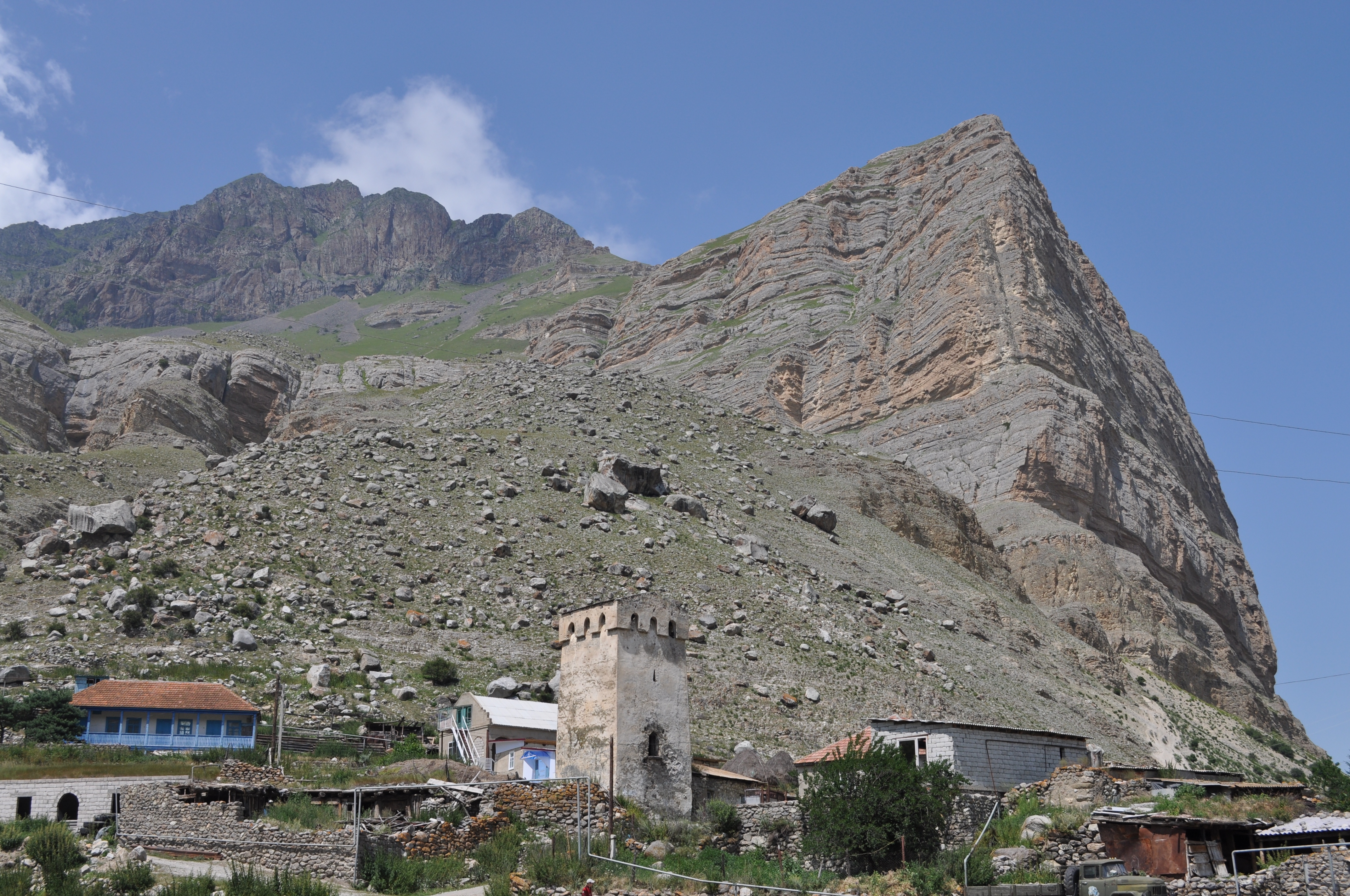 Панорама с.Эльтюбю с башней князей Балкаруковых в центре